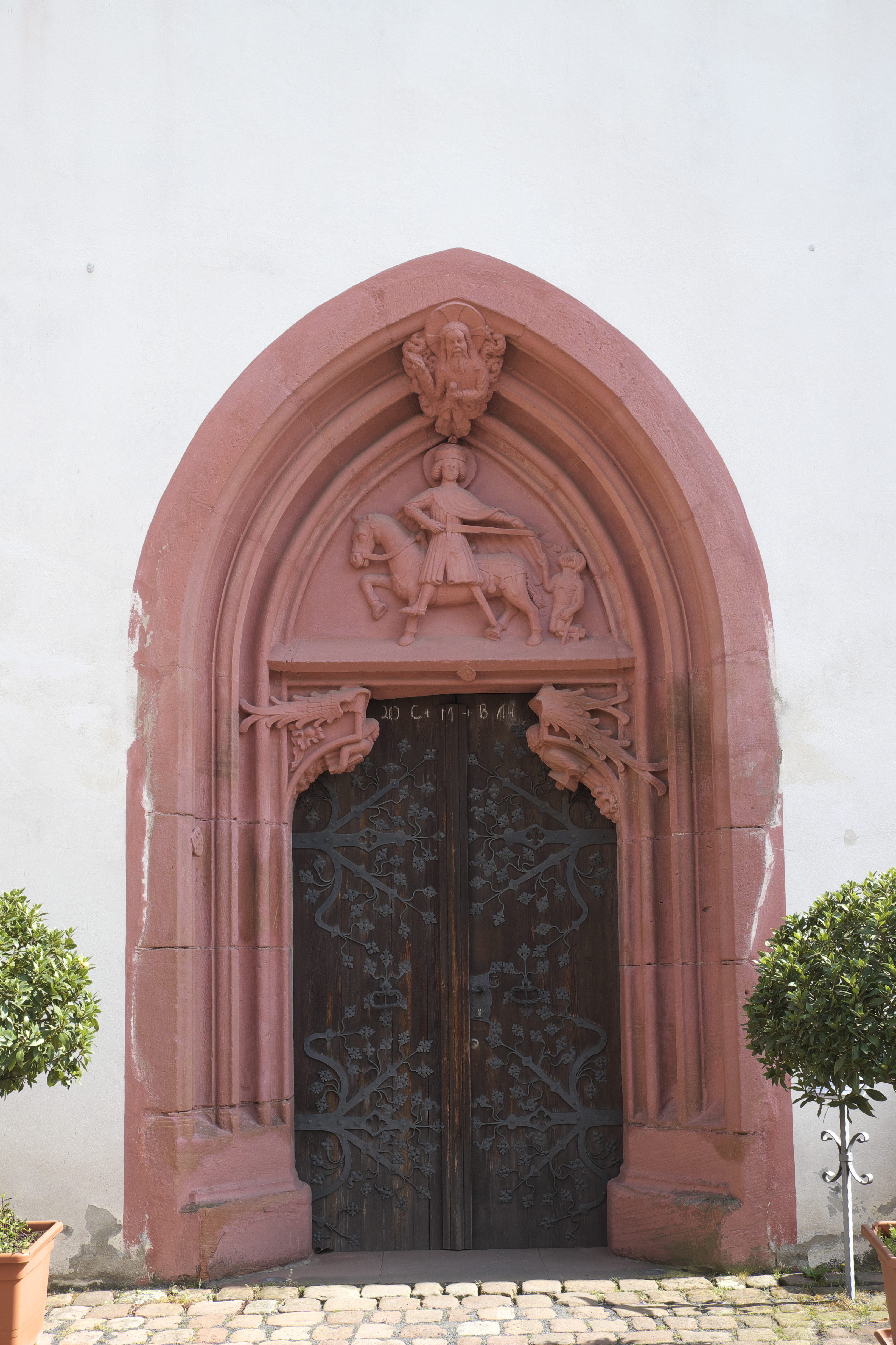 Katholische Martinskapelle in Bürgstadt im Landkreis Miltenberg (Unterfranken/Bayern), gotisches Westportal, um 1490, Relief im Tympanon, Darstellung: Hl. Martin und Bettler, Konsolen am Türstürz mit Engelsfiguren